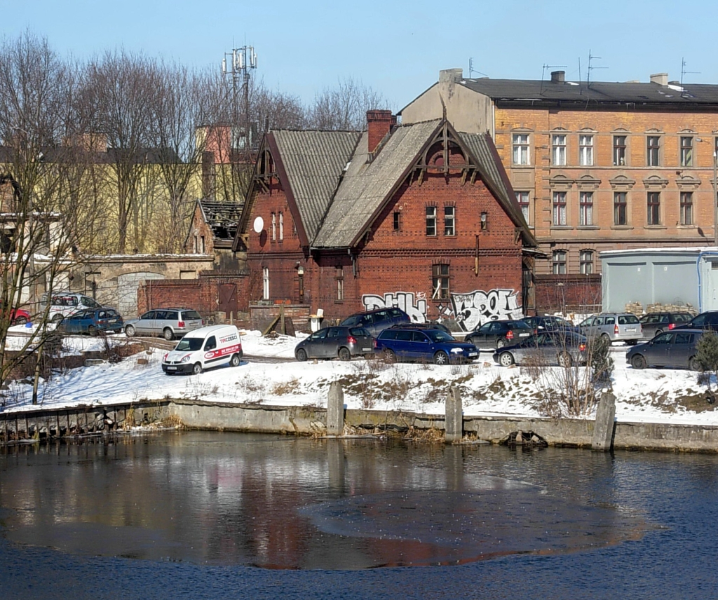 Dom śluzowego przy ul. Grottgera, położony przy zasypanej dawnej śluzie II Kanału Bydgoskiego